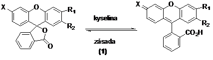 Iónochromizmus fluoránov